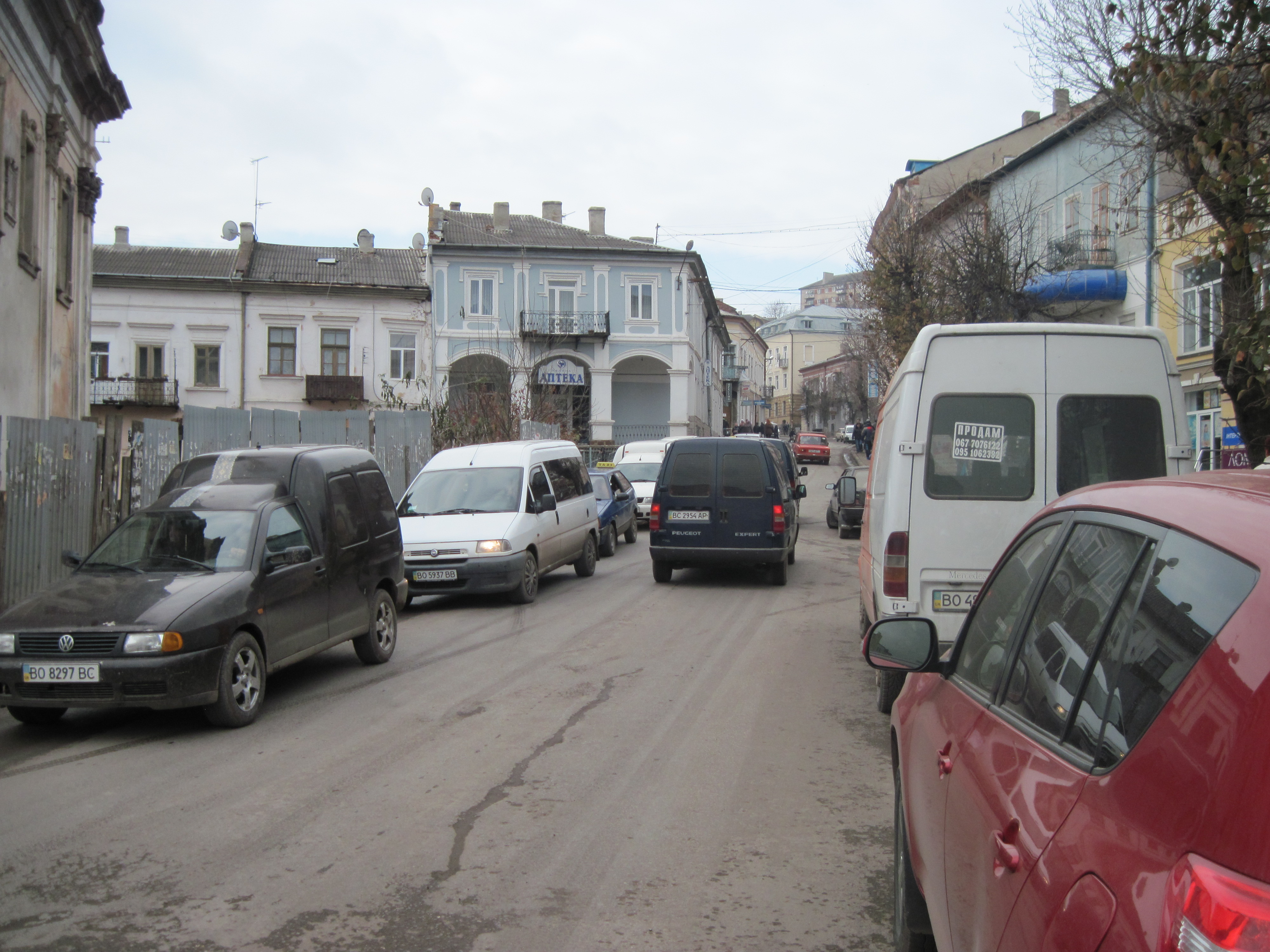 Бучач, суботній корок, 2014